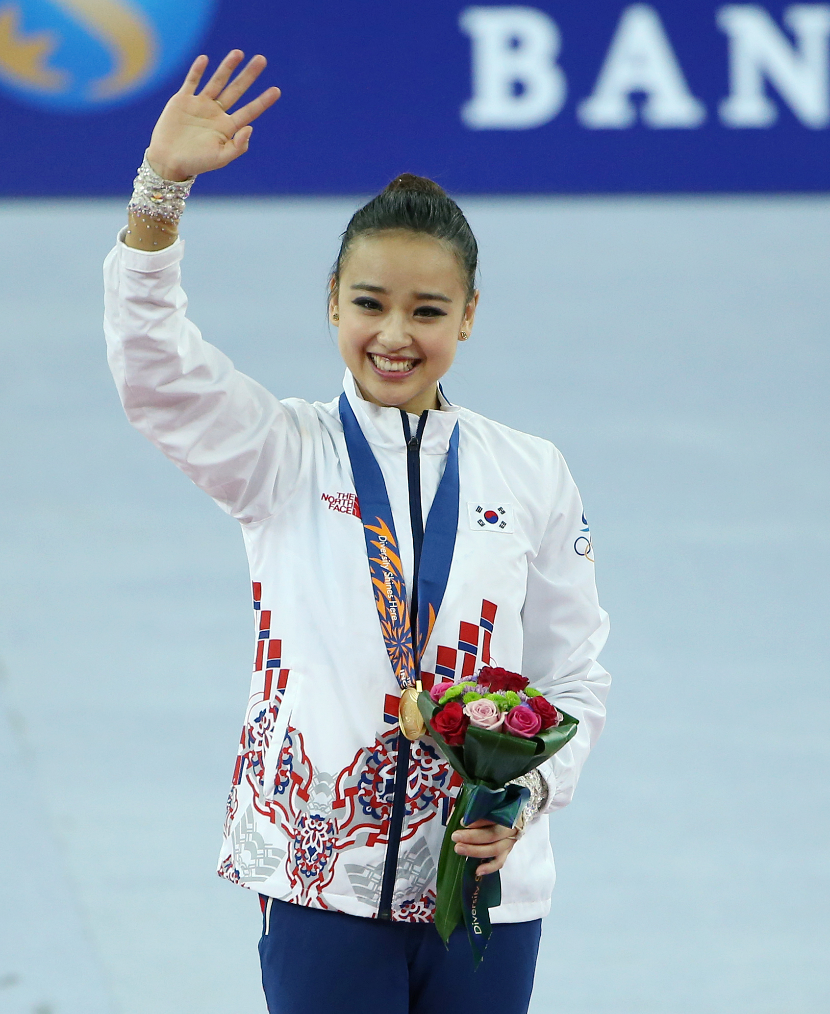 2014인천 아시아경기대회리듬체조손연재가 2일 인천시 남동체육관에서 열린 ‘2014 인천 아시아경기대회’ 리듬체조 개인전 결승에서 후프 연기를 펼치고 있다.2014-10-02남동체육관, 인천시문화체육관광부해외문화홍보원코리아넷전한